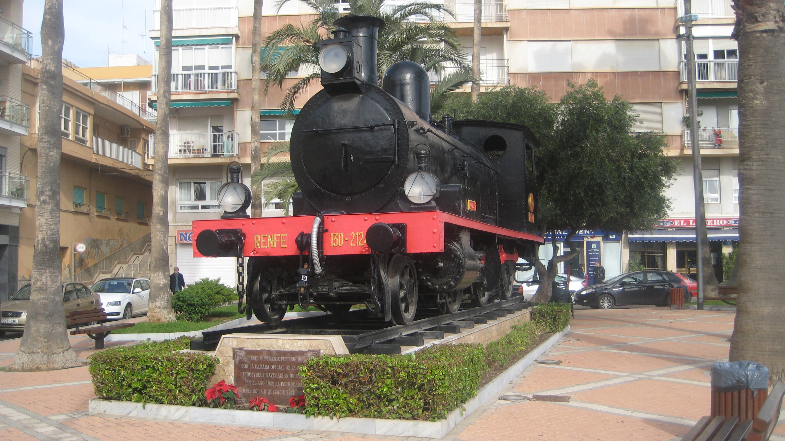 Locomotora de vapor de RENFE 130-2124 en Águilas, Región de Murcia, España.